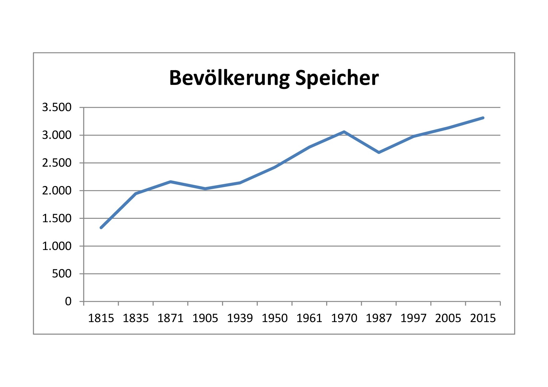 54662 Speicher. Grafische Entwicklung der Bevölkerung. Stand 2015.